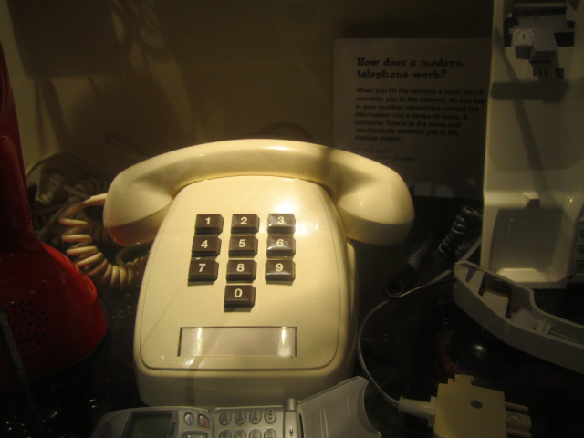 डीटीएमएफ प्रकारचे दूध्वनी यंत्र